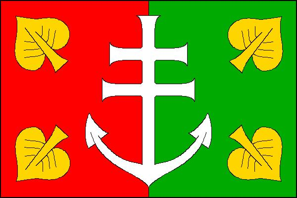 Vlajka obce Lipůvka